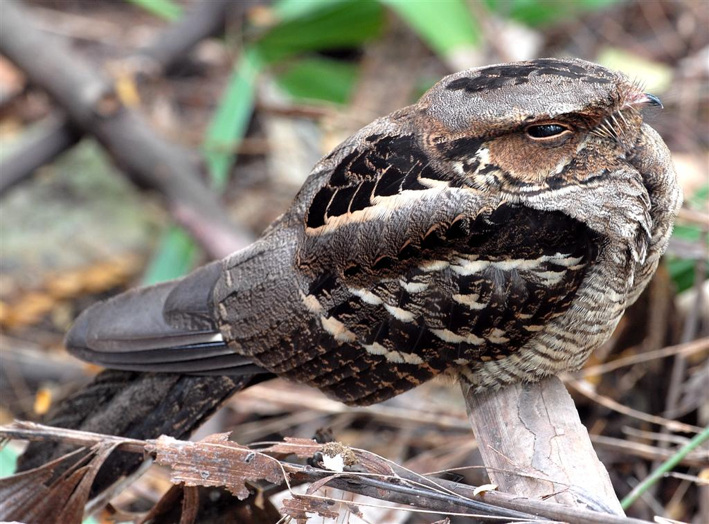 Large-tailed Nightjar Caprimulgus_macrurus